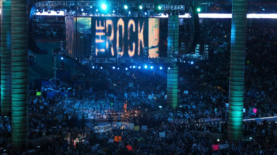 Le Rock de retour a WrestleMania